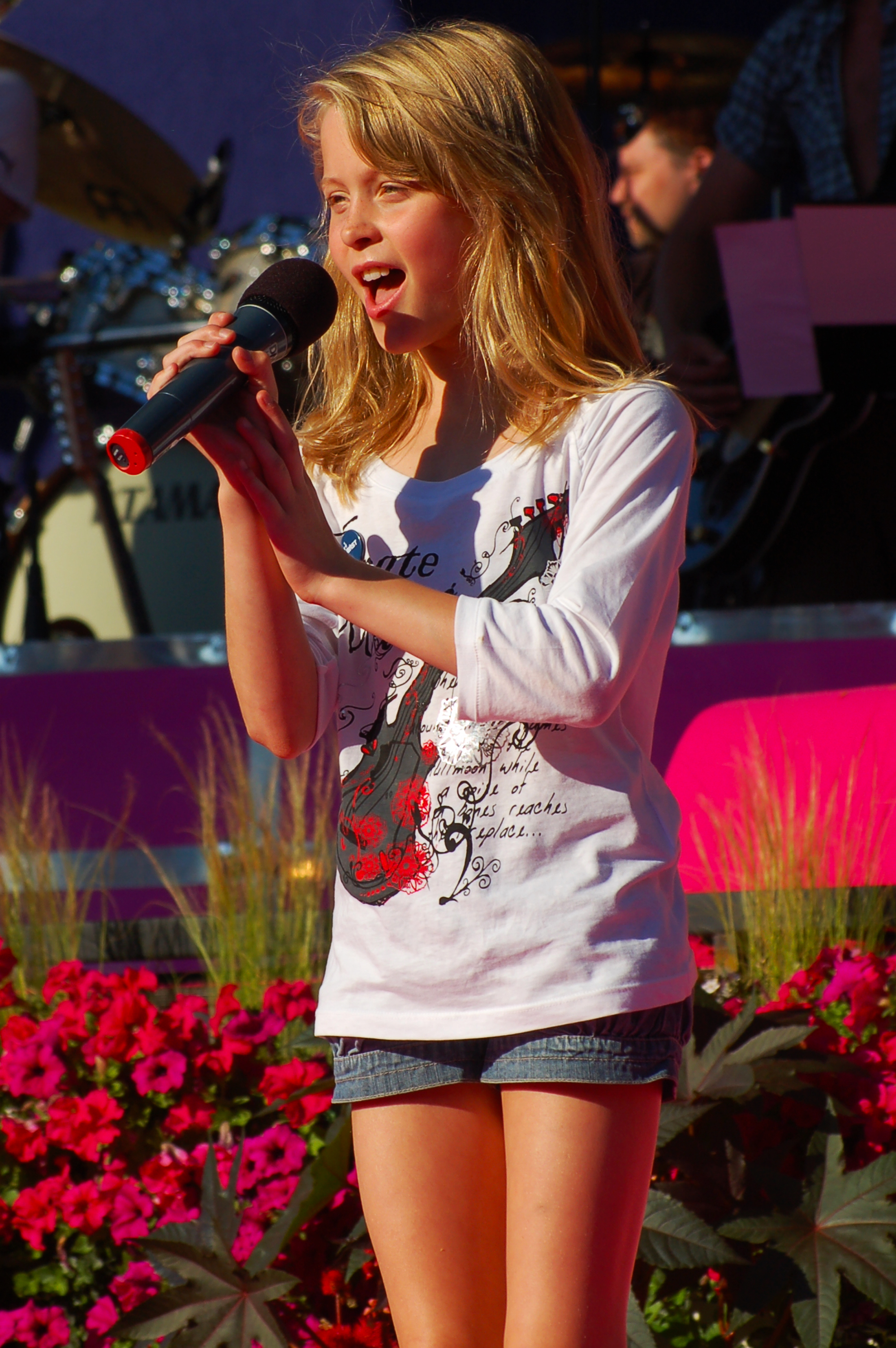 Zara Larsson uppträder på Sommarkrysset i Stockholm inne på Gröna Lund.